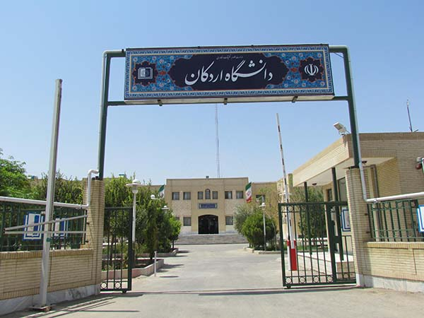 سردر دانشگاه